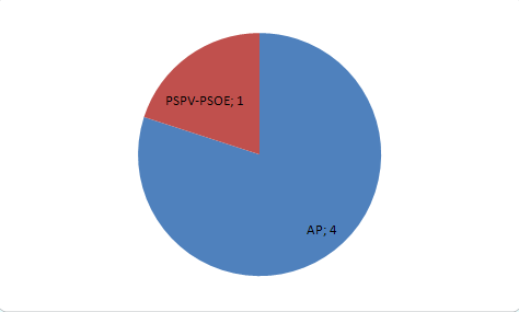 Número de concejales de las elecciones locales de 1987 en Segart